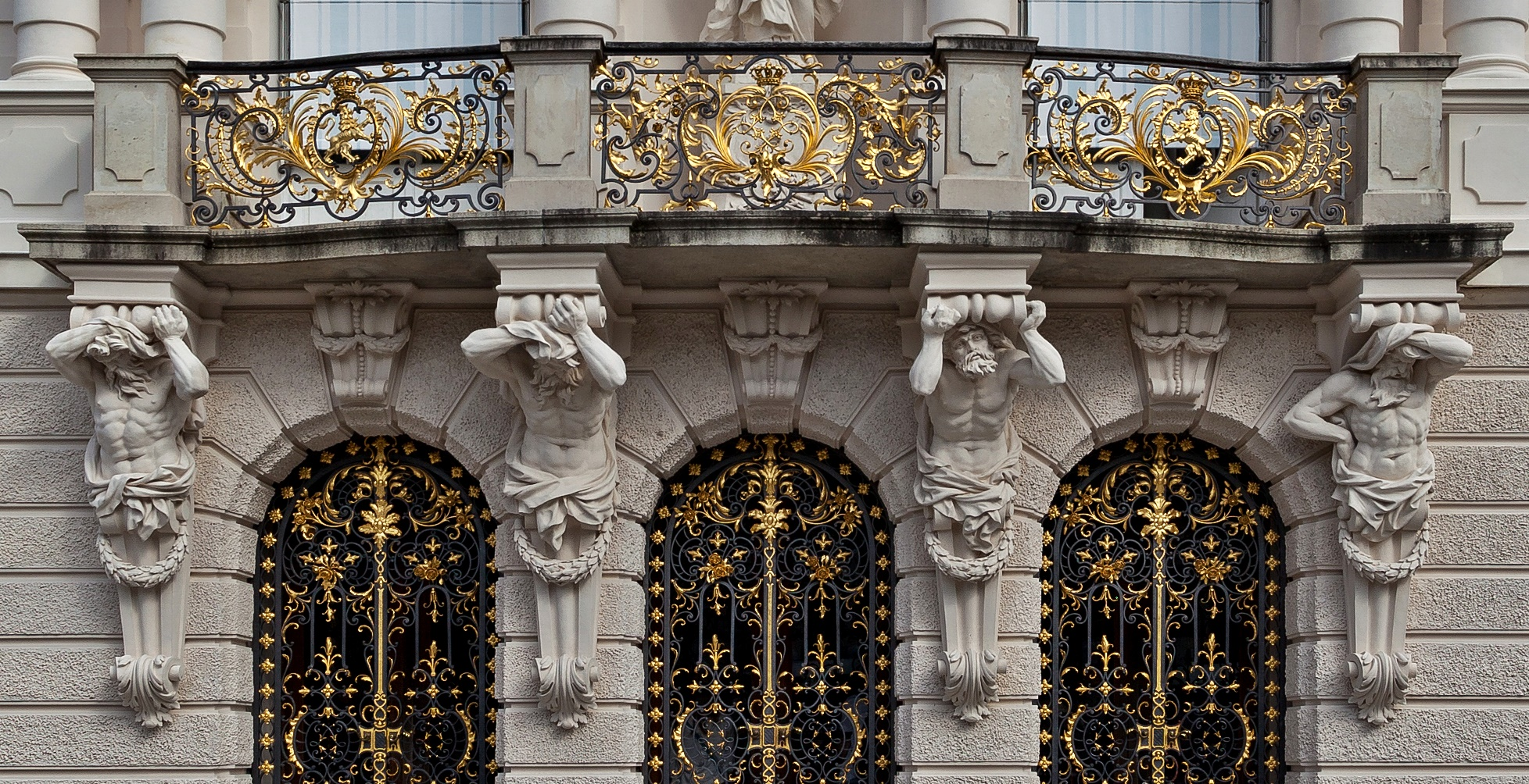 Atlanten an der Fassade von Schloss Linderhof, geschaffen von Philipp Perron (1840-1907)